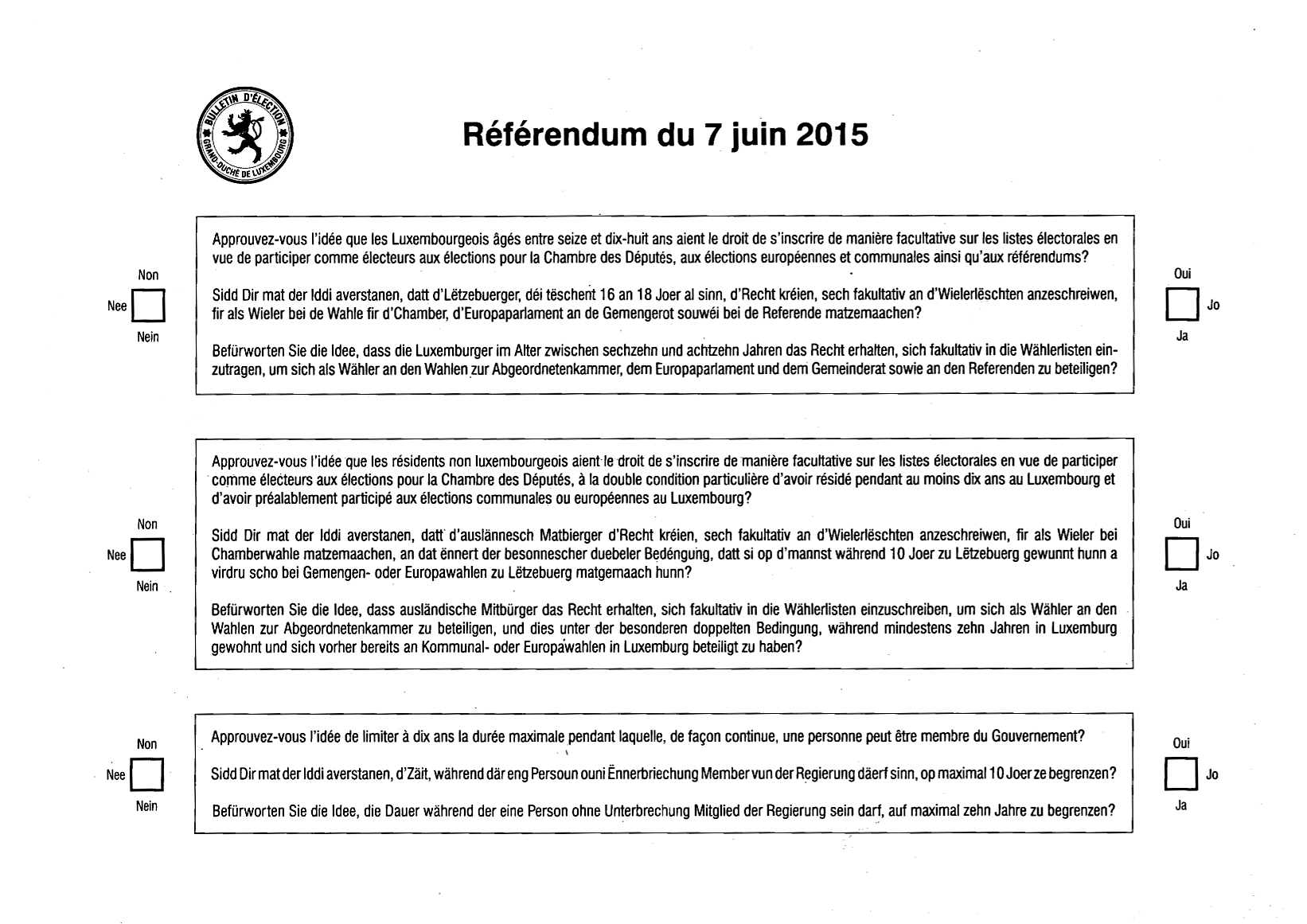 Stëmmziedel fir de Referendum vum 7. Juni 2015.